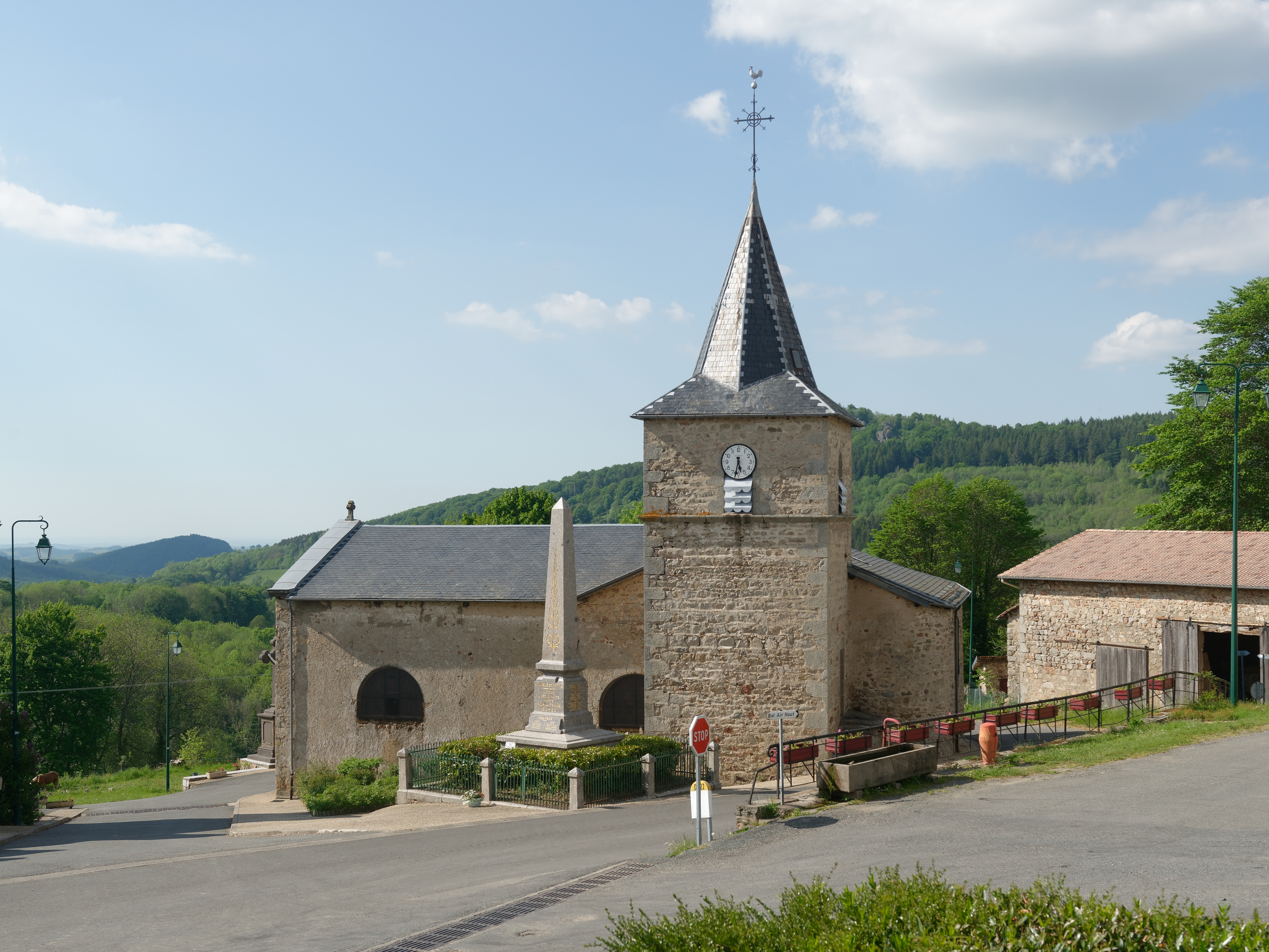 Église Saint-Vincent de Lavoine, dans l'Allier.